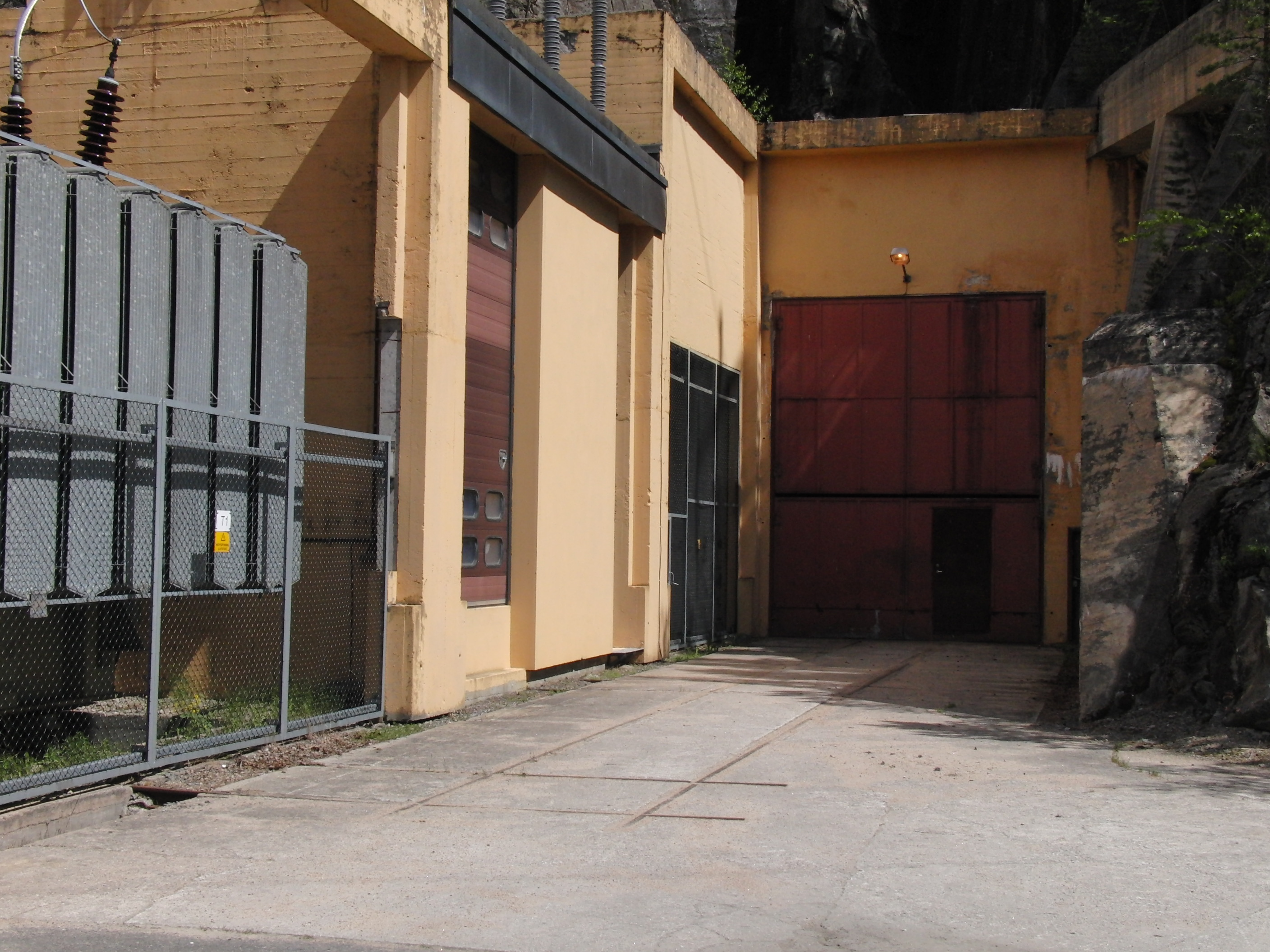 Høgefoss kraftverk, fjellportal